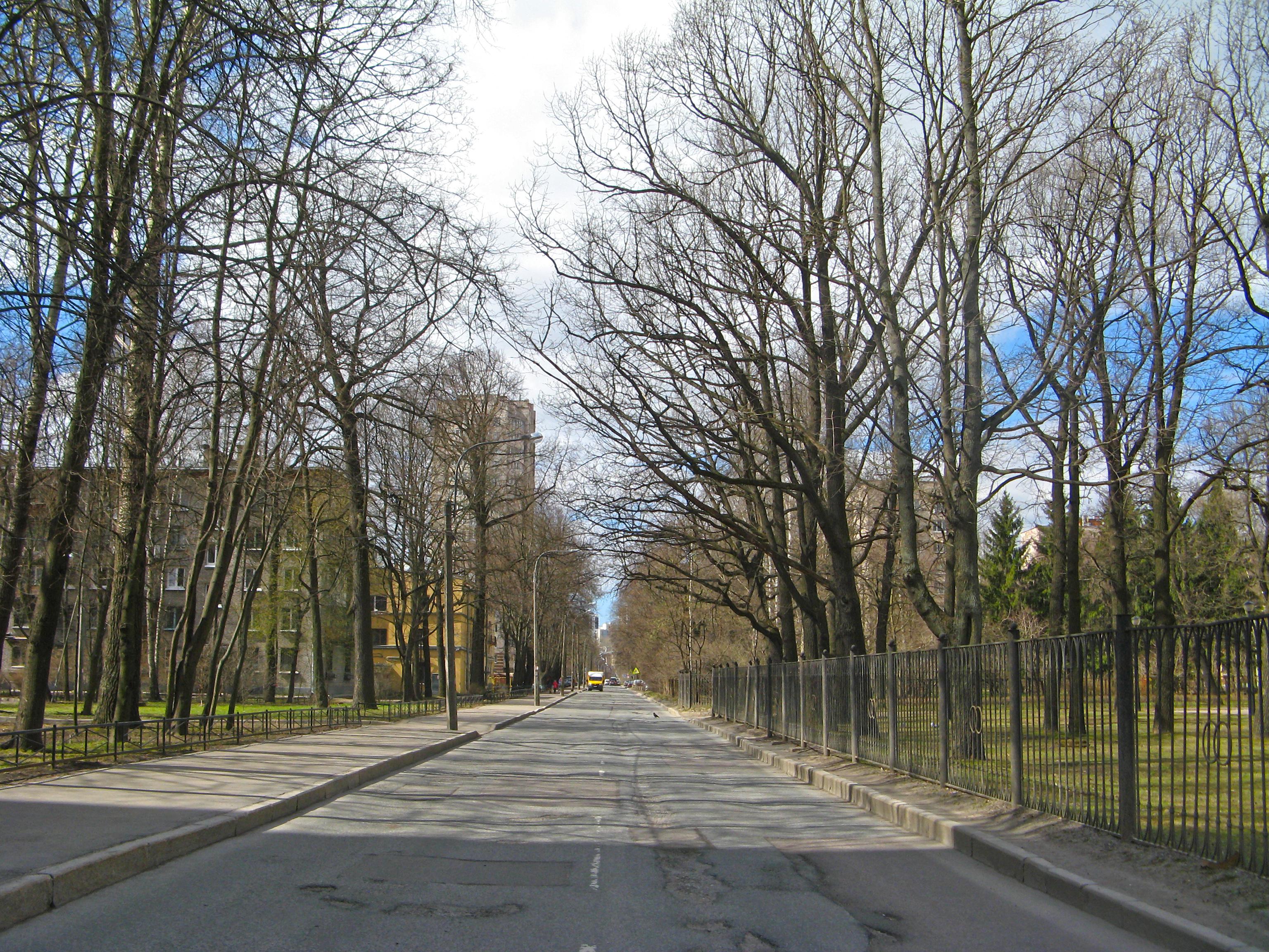 Проспект Пархоменко в Санкт-Петербурге